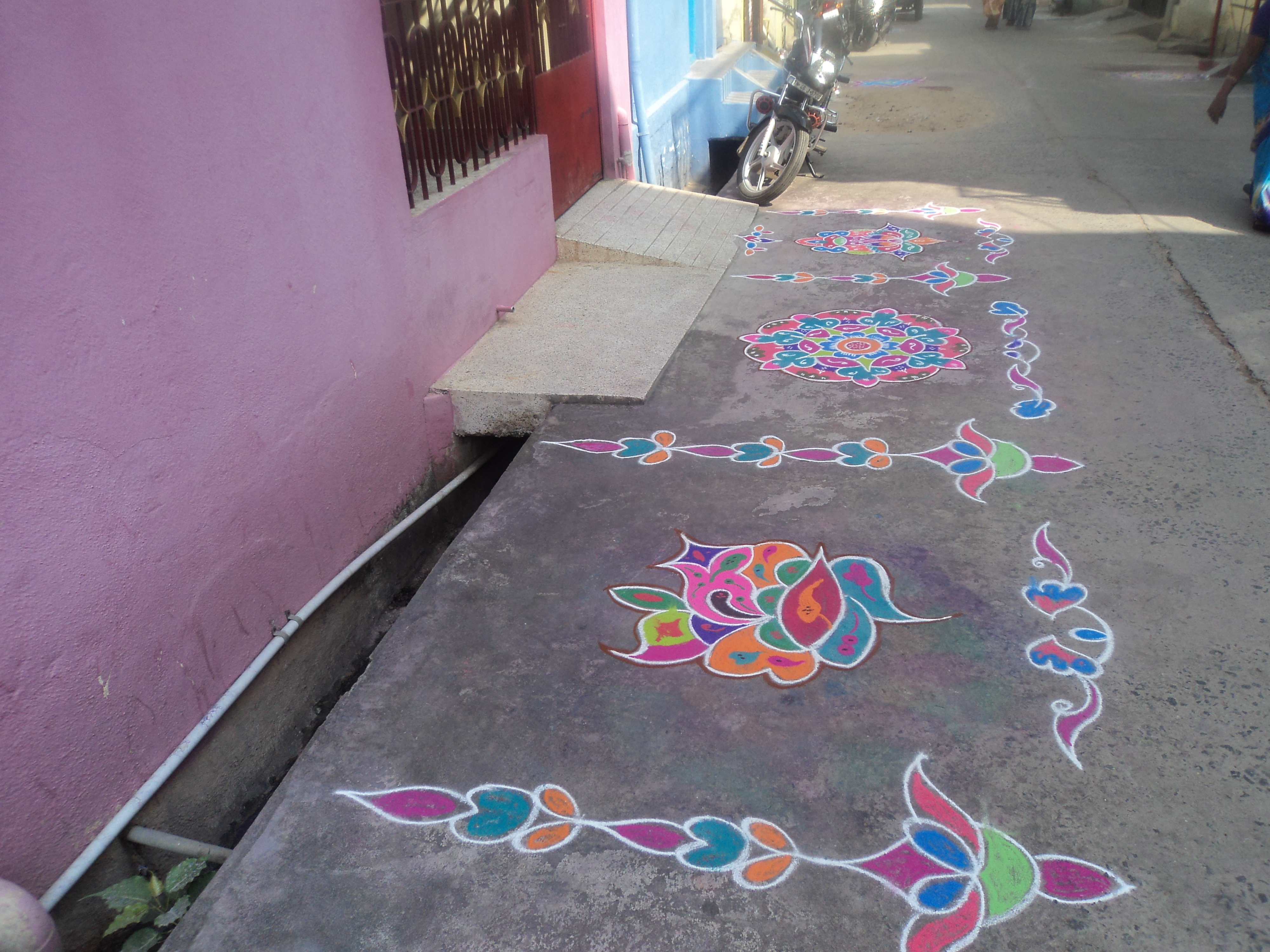 தமிழகத்தில் பொங்கல் திருநாளன்று, ஒவ்வொரு வீட்டு வாசலிலும் நிறக்கோலங்கள் போடும் வழமை உள்ளது. இப்படம், சேலம் மாவட்டம் ஆத்தூரில், பொங்கலன்று எடுக்கப்பட்டது